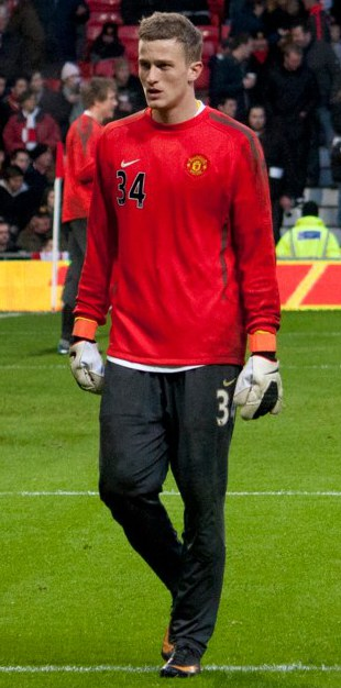 Anders Lindegaard & Michael Carrick